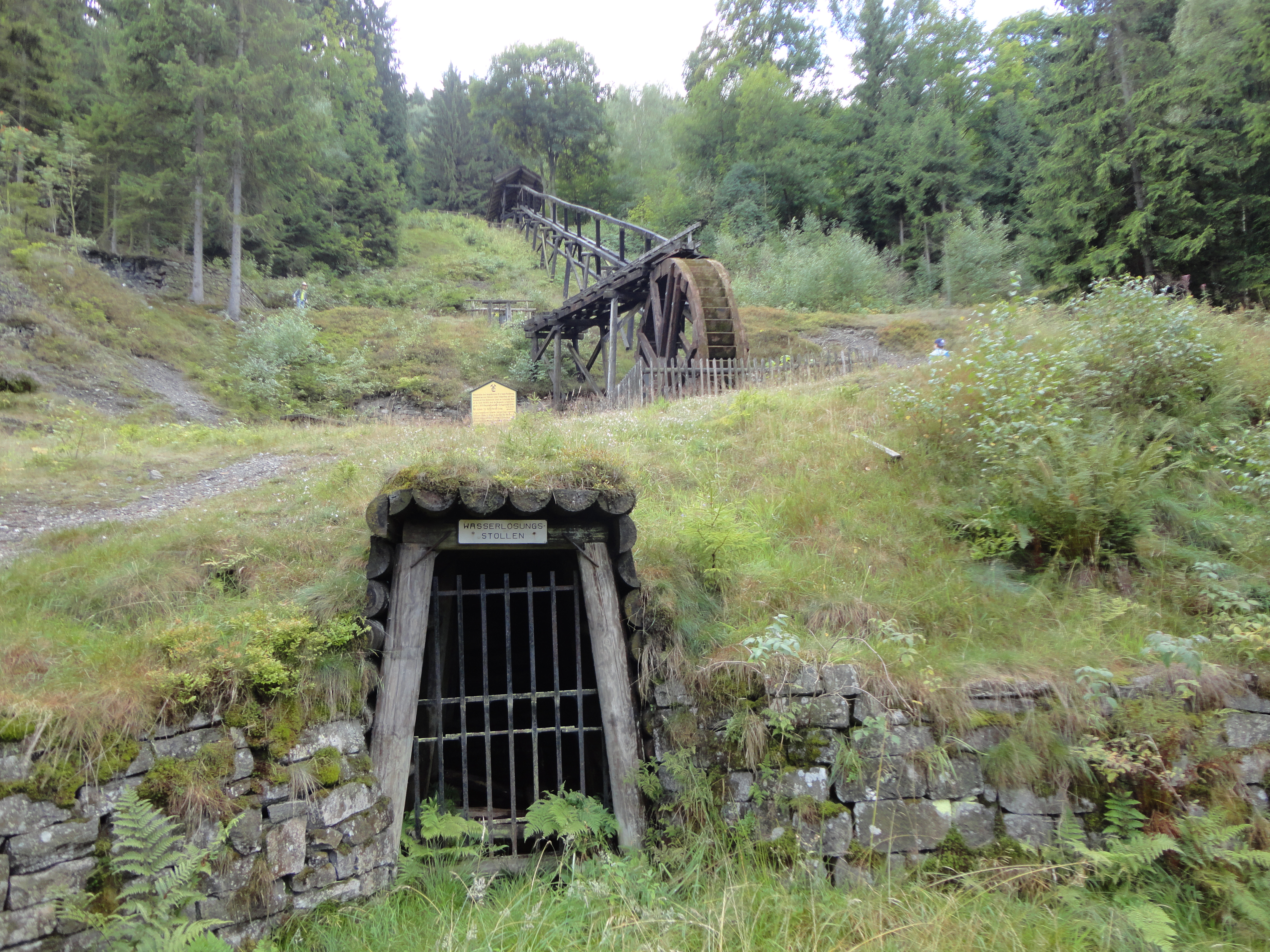 Nachbau eines Kunstgezeuges am Standort des ehemaligen Maaßener Kehrrades in Lautenthal (Harz)